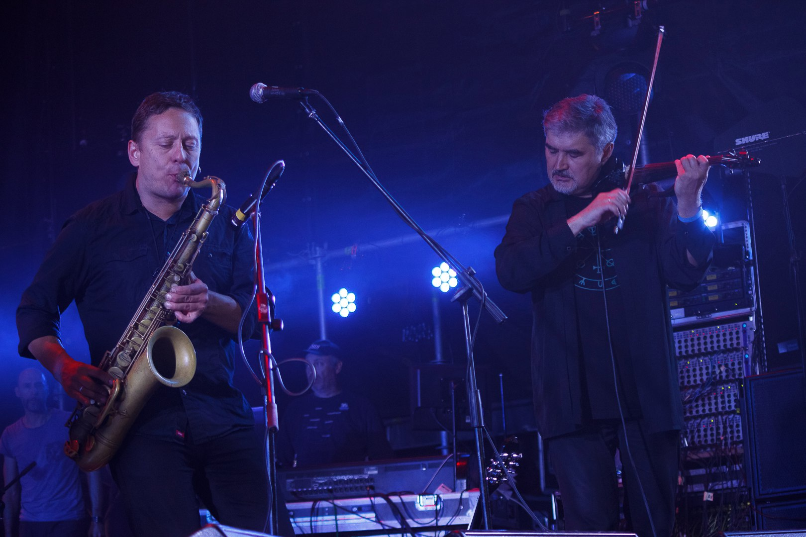 Борис Гребенщиков та група «Аквариум» на музичному фестивалі Atlas Weekend (8—10 липня 2016 року, Київ)